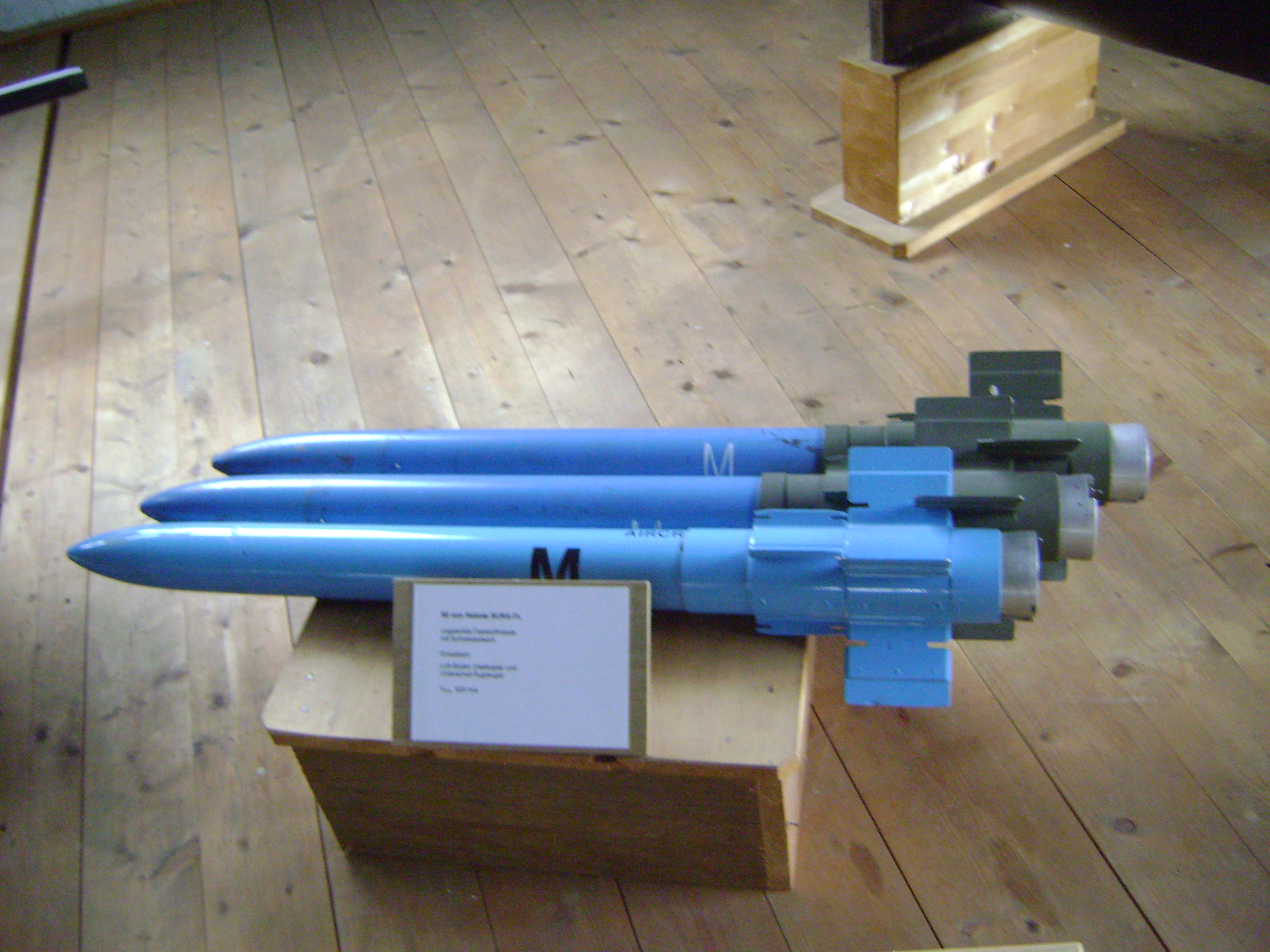 SURA MISSILE